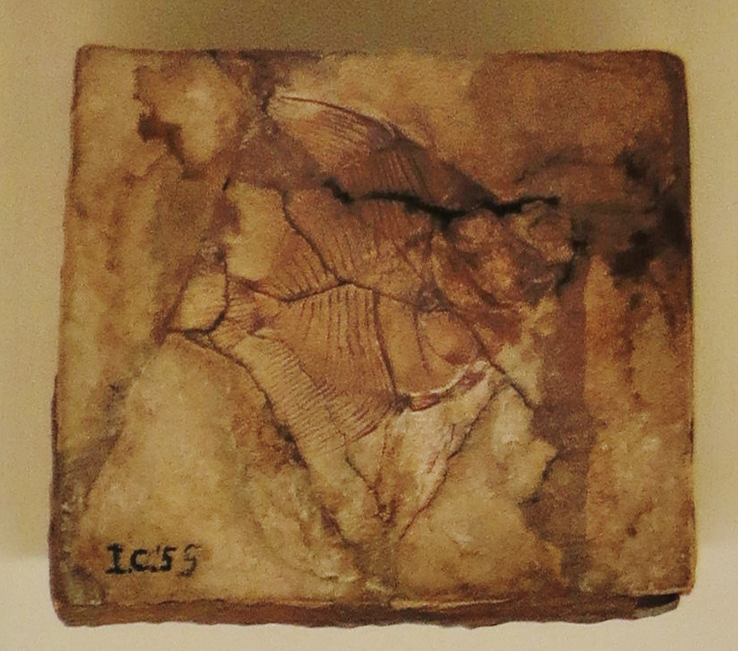 Fossil - Took the picture at Museo di storia naturale di Verona